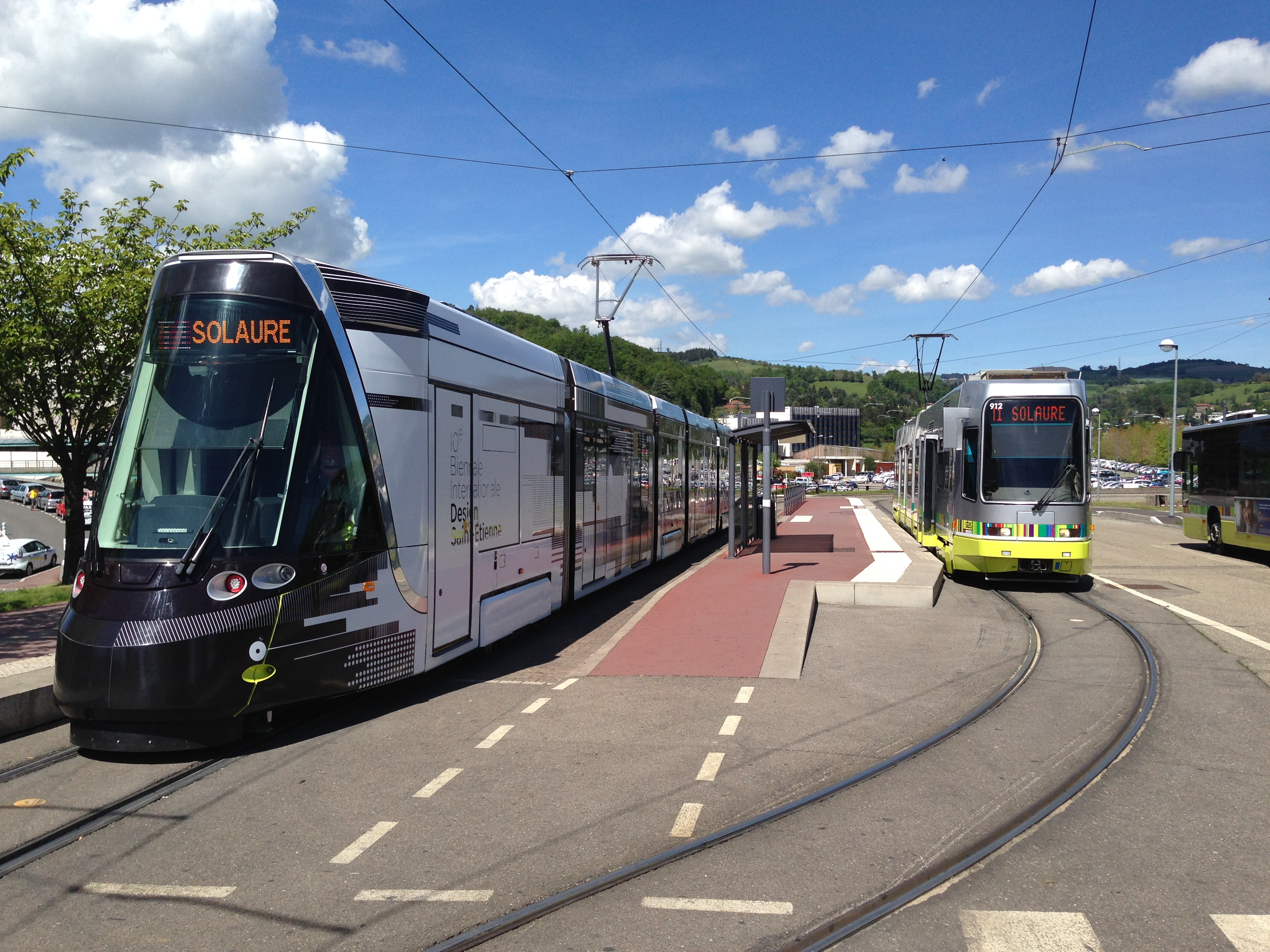 Deux modes de tramway à Saint-Etienne